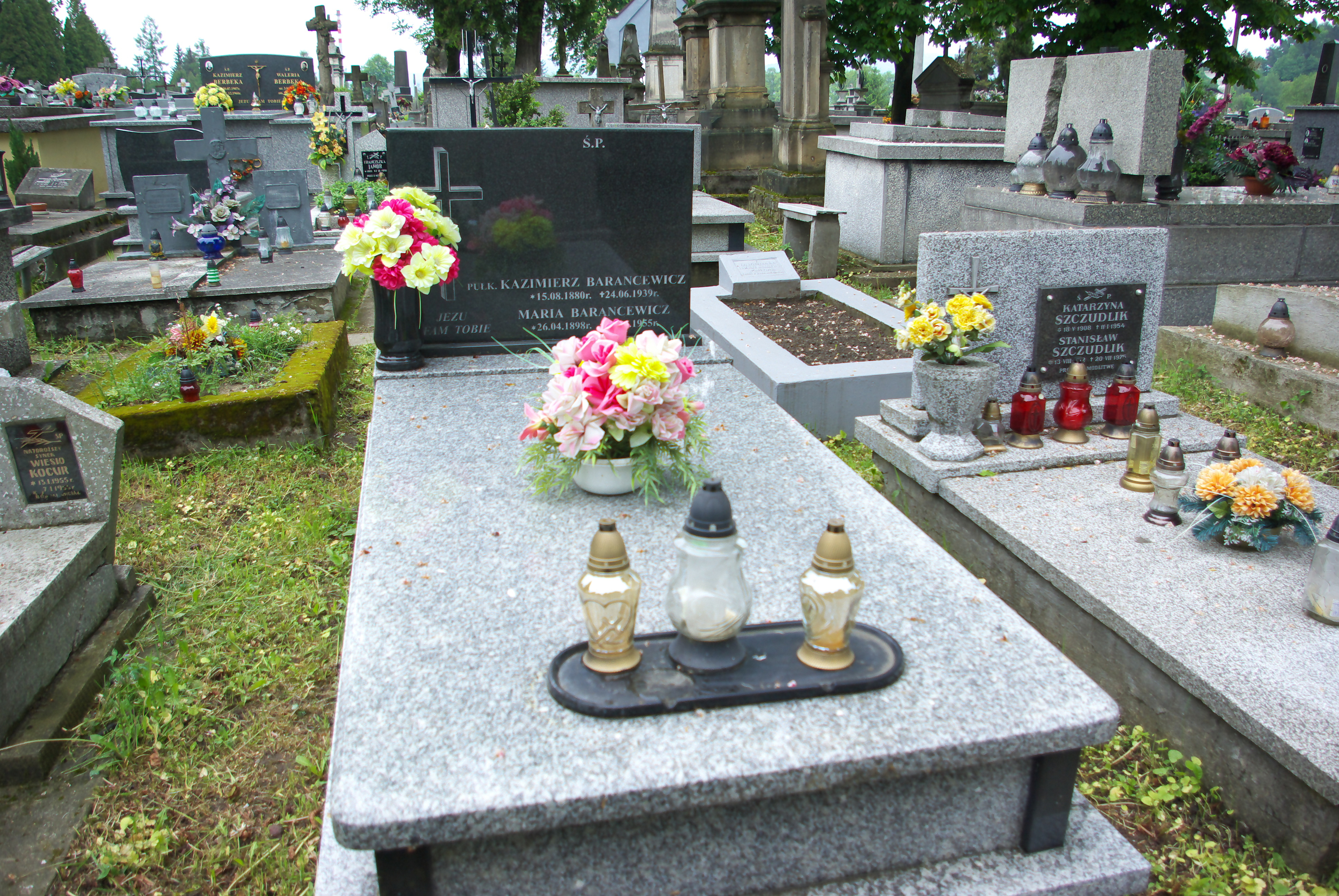 Grobowiec rodzin Drożdżak i Szwanda na Cmentarzu Centralnym w Sanoku. Pochowany płk inż. Kazimierz Barancewicz